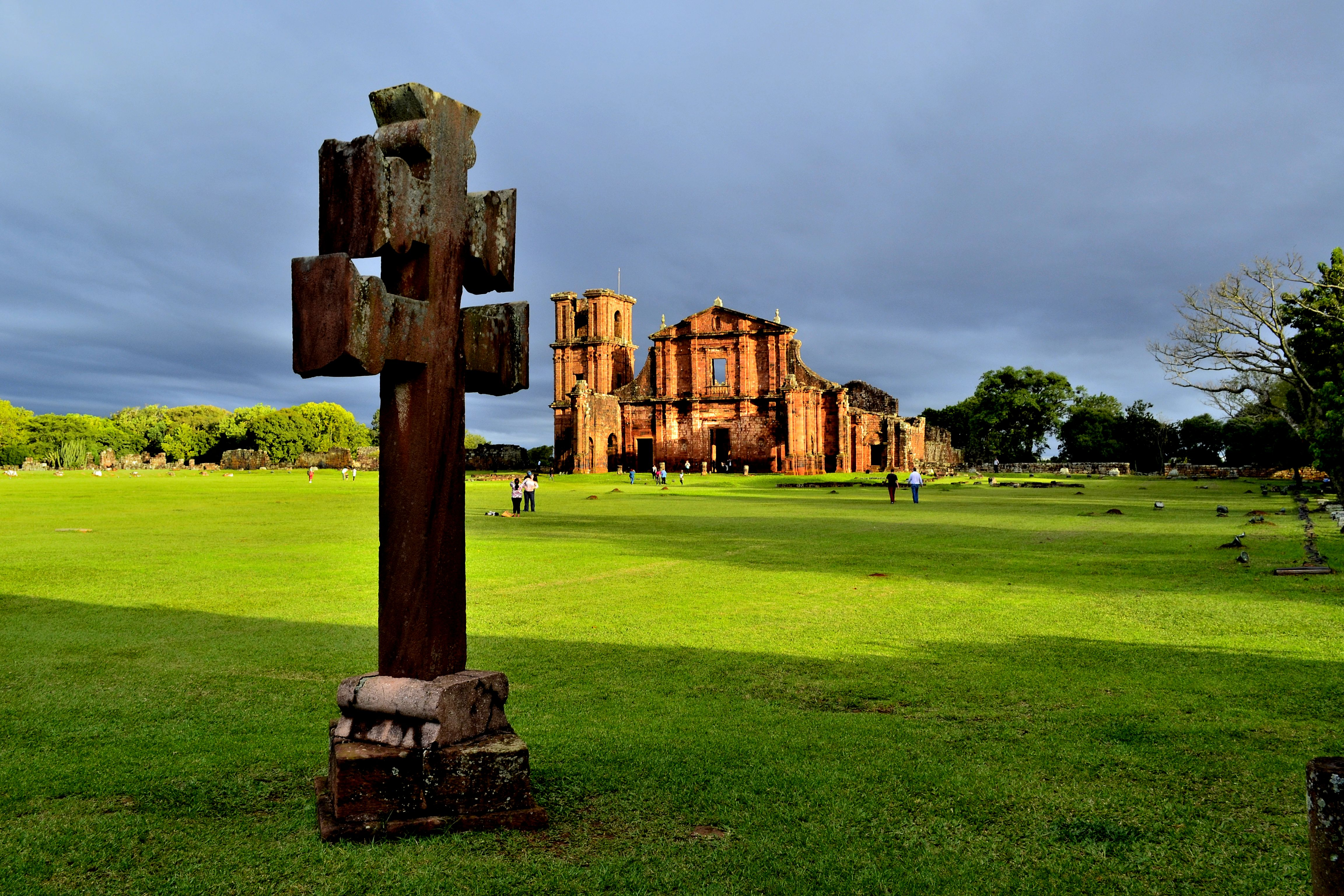 Sitio arqueológico de Sao Miguel Arcanjo em Sao Miguel das Missões que abriga as ruinas das antigas reduções Jesuíticas, integrante dos chamados sete povos das Missoes.